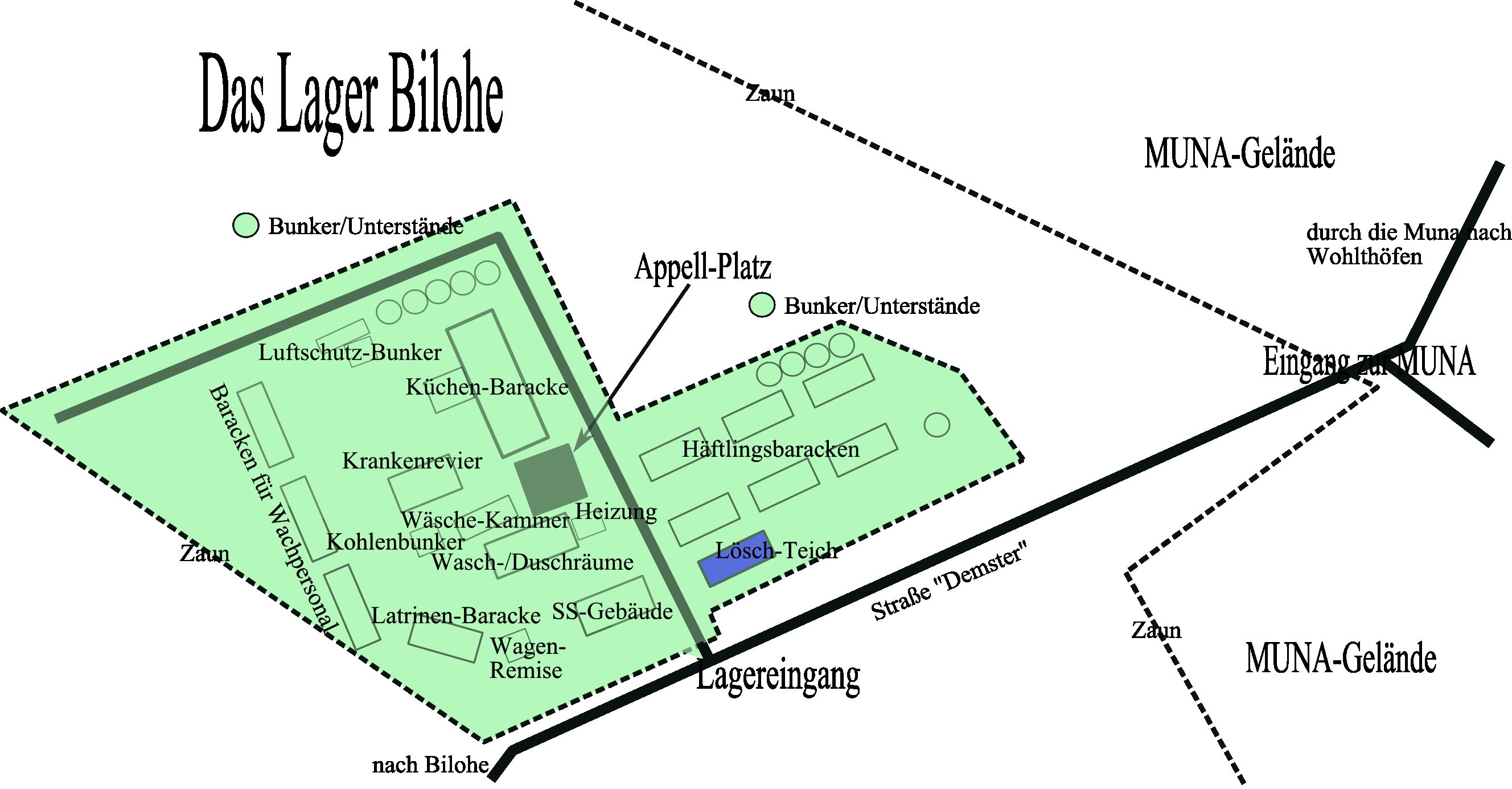 Das Lager Bilohe für Ostarbeiterinnen und später KZ-Außenlager des KZ Neuengamme